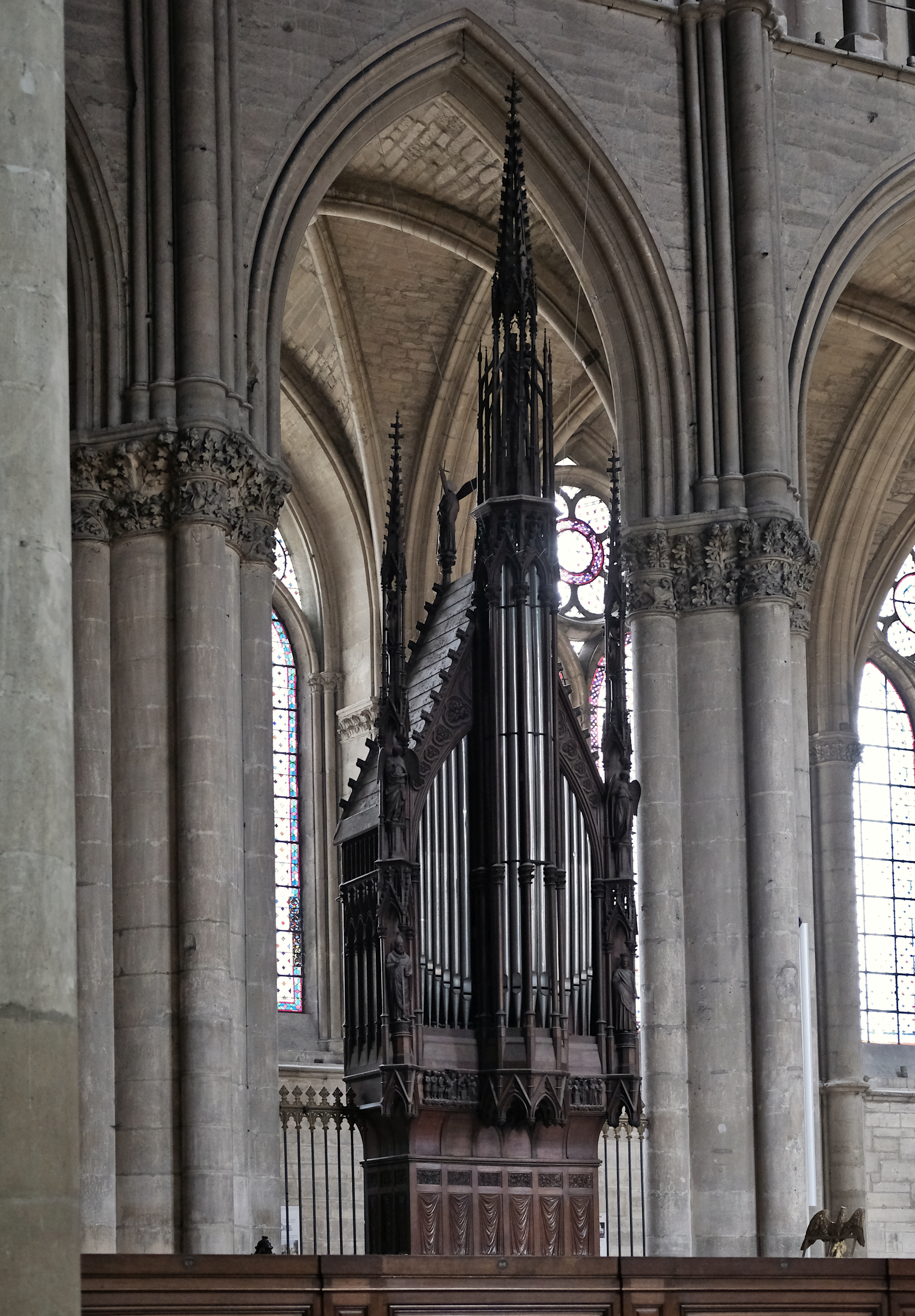 Cathédrale de Reims (orgue du choeur).